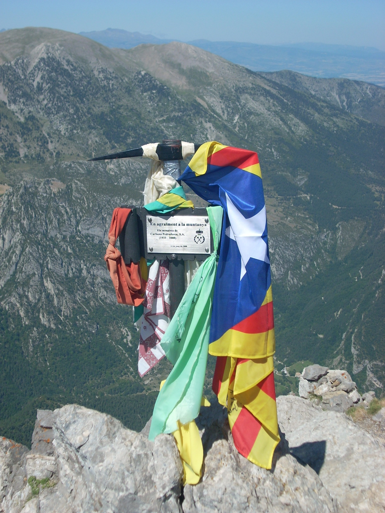 Cim del Pedraforca